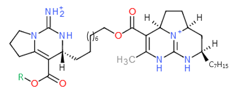 Estructura molecular de la batzelladina B